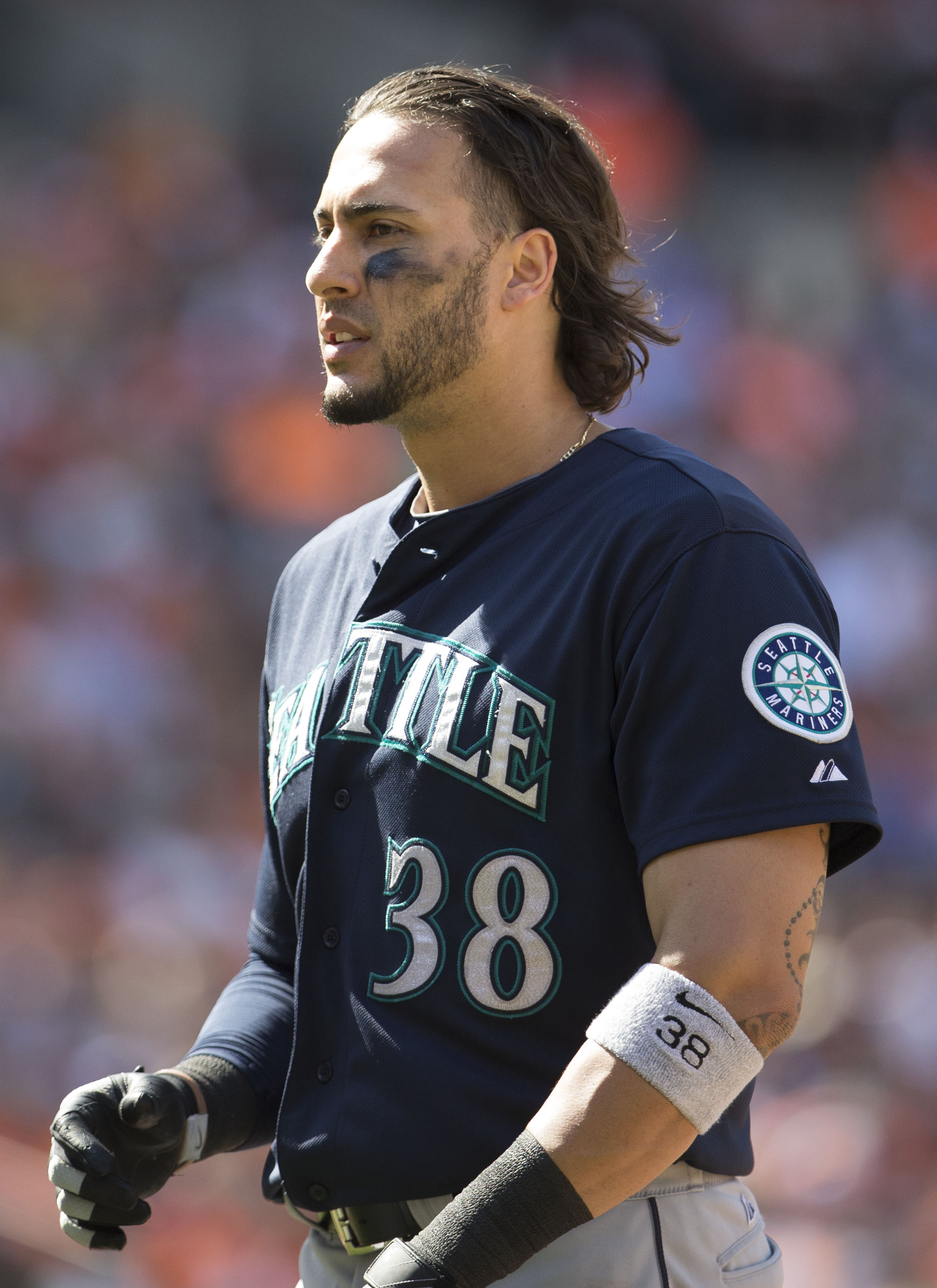 Michael Morse